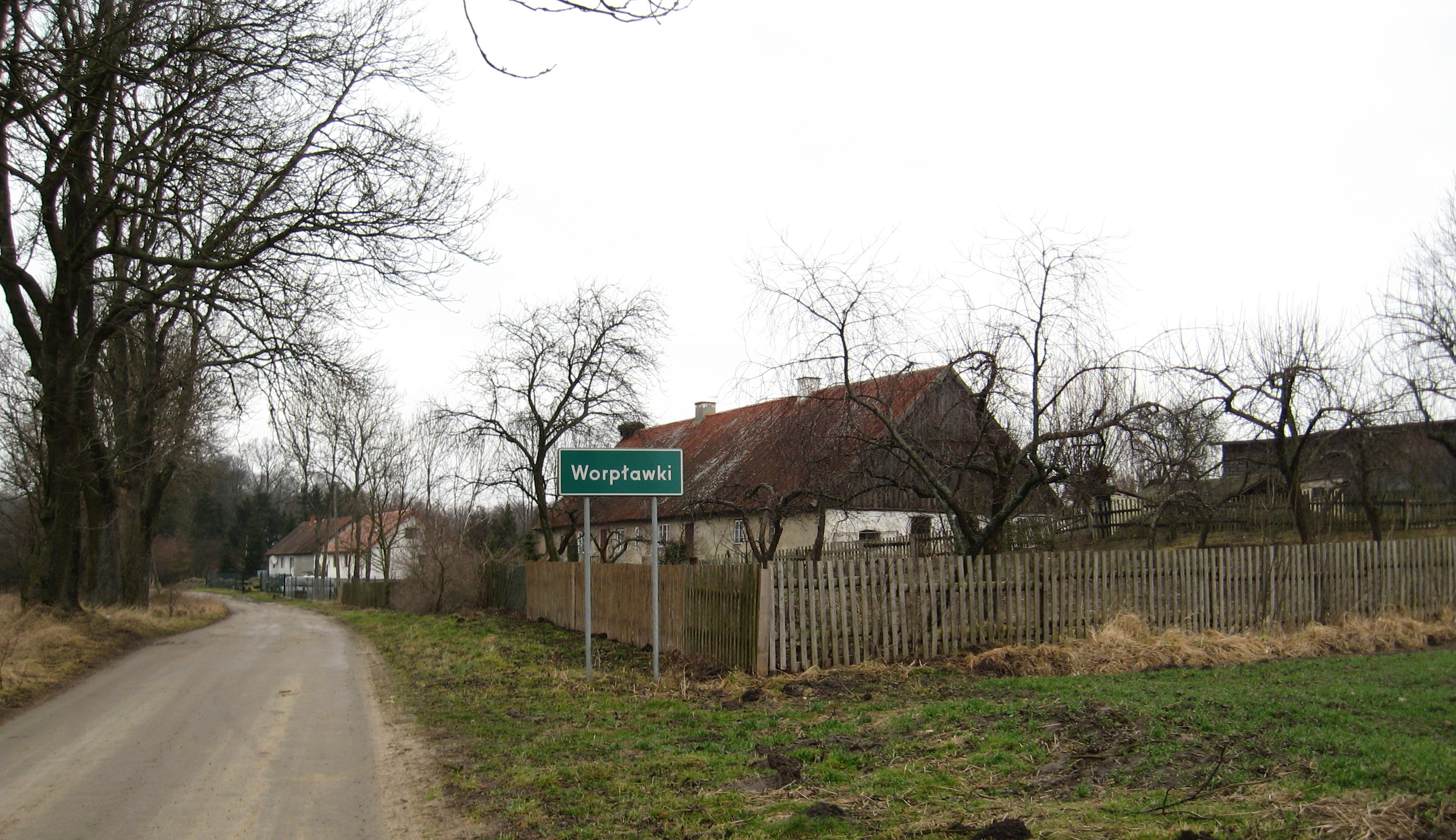 Worpławki - OpenStreetMap(Info)